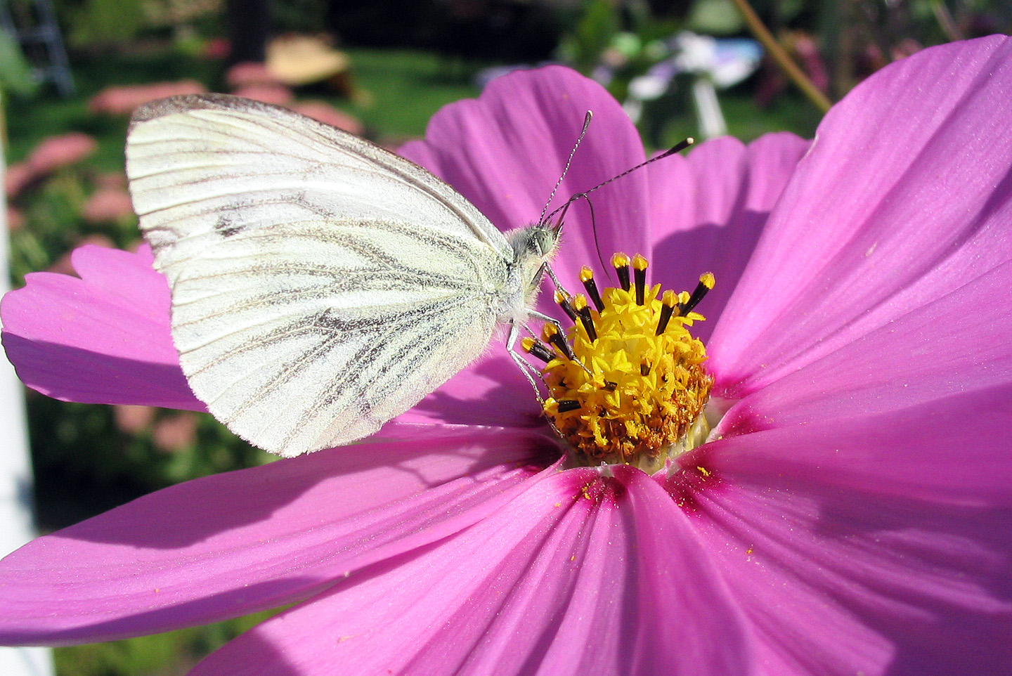 Beschreibung: Rapsweißling (Pieris napi) auf Cosmos bipinnatus Fotograf: Darkone, 6. September 2004